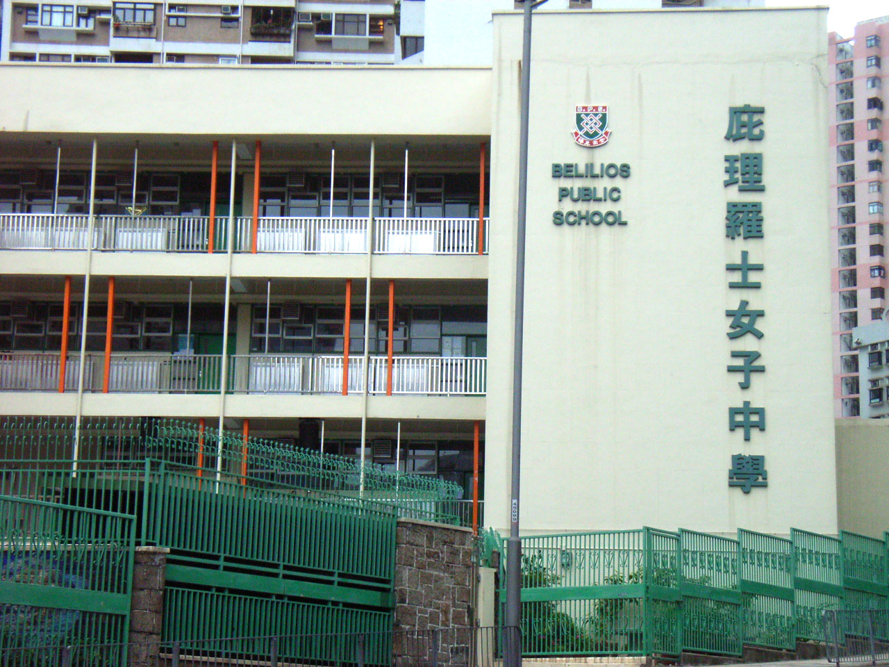 中文（香港）: 庇理羅士女子中學, 天后廟道51號